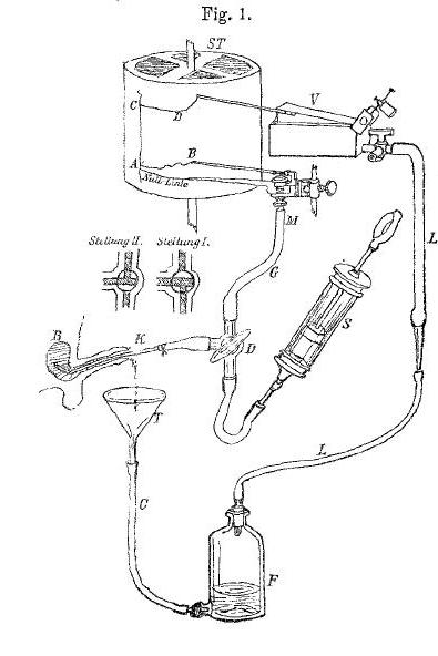 Originalzeichnung der simultanen Registrierung von Blasendruck und Miktionsvolumen bei einer Versuchsperson.